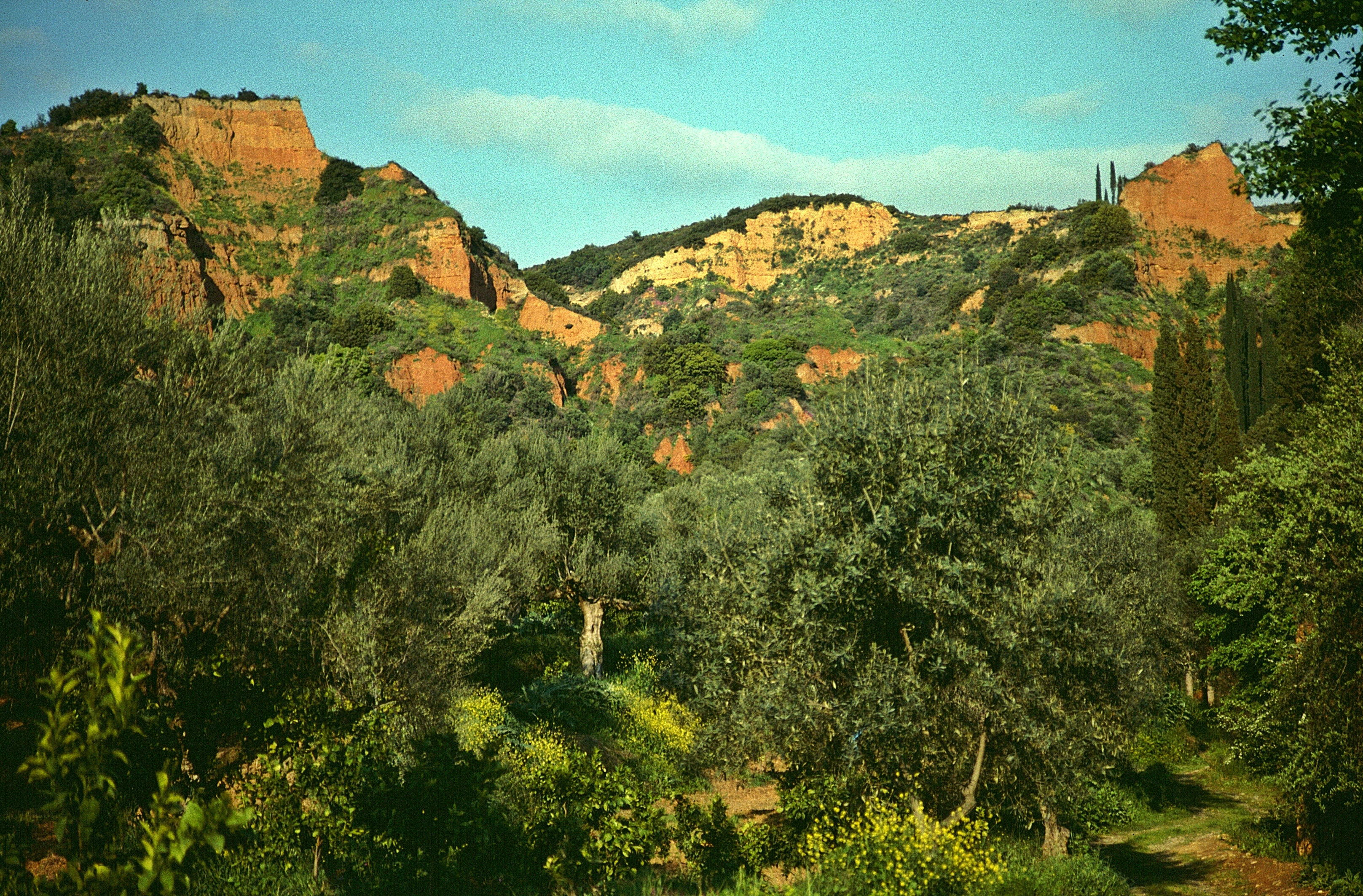 Landschaft bei Sparta/Peloponnes